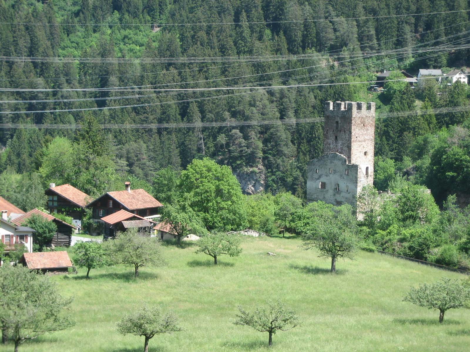 Lage neben Weiler